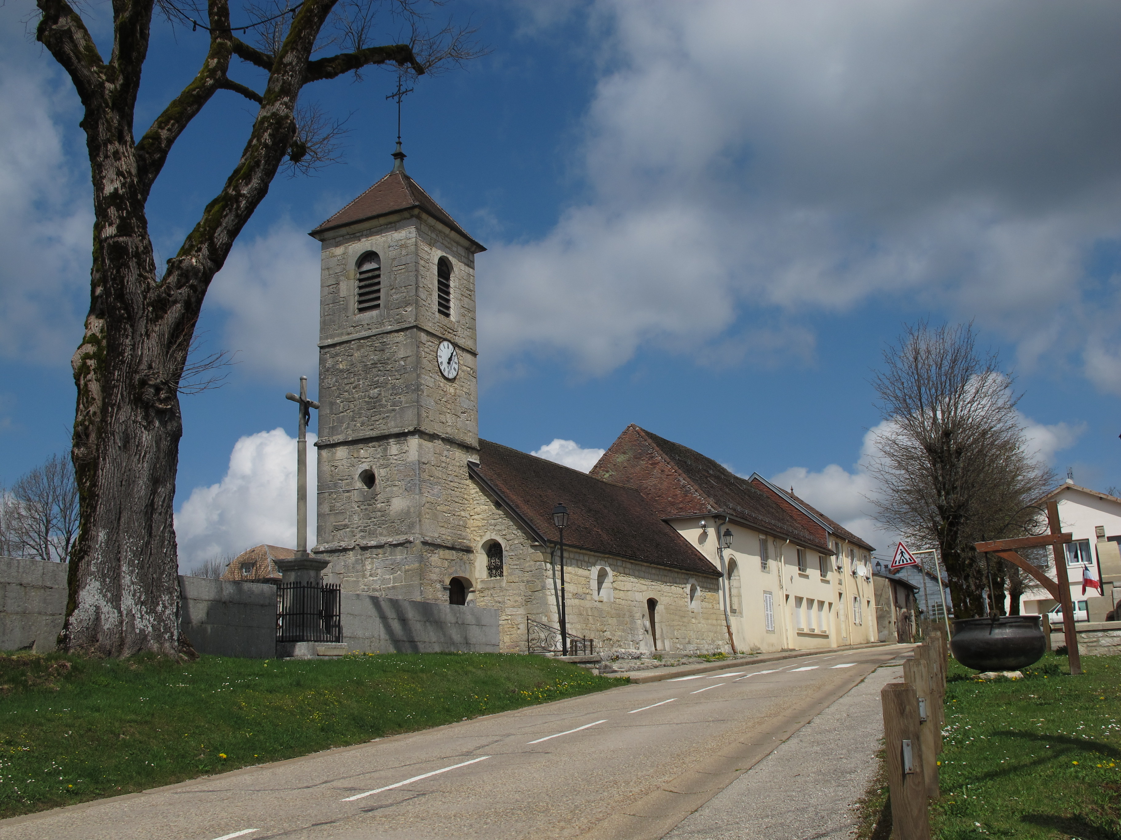 Le Frasnois